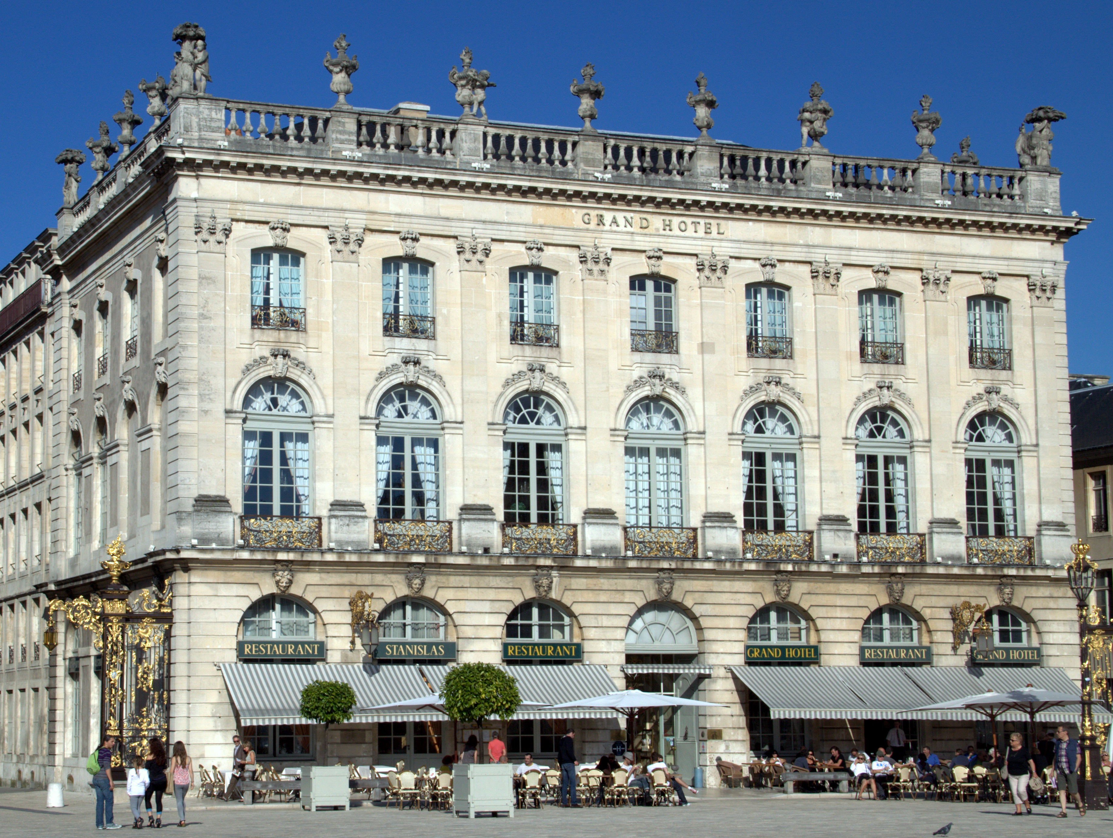 Grand Hôtel de Nancy